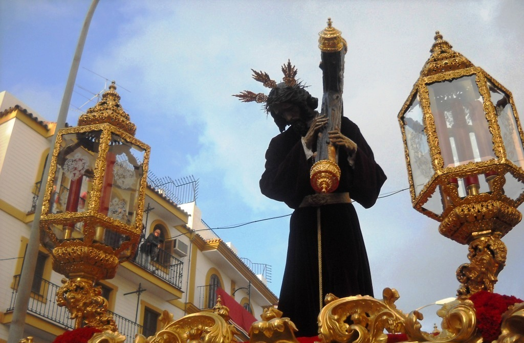 Cristo de las Penas